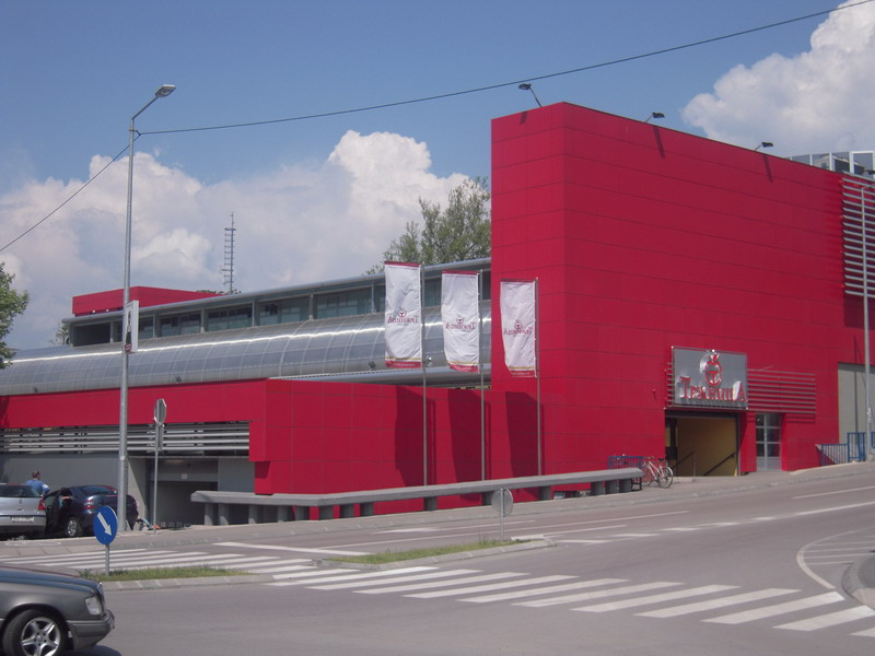 Gradska_tržnica (Banja Luka)